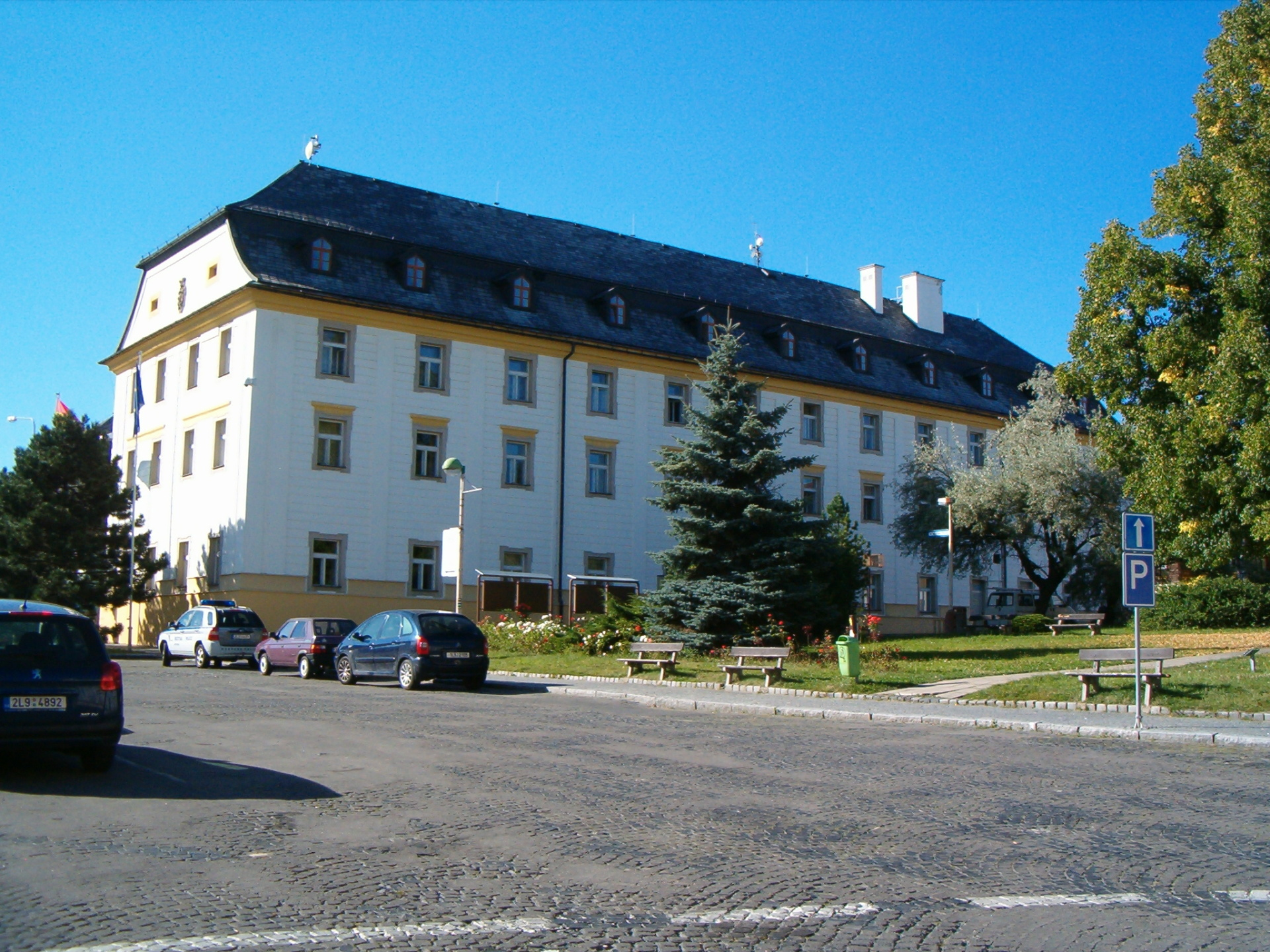 Nový Bor, náměstí a blízké okolí